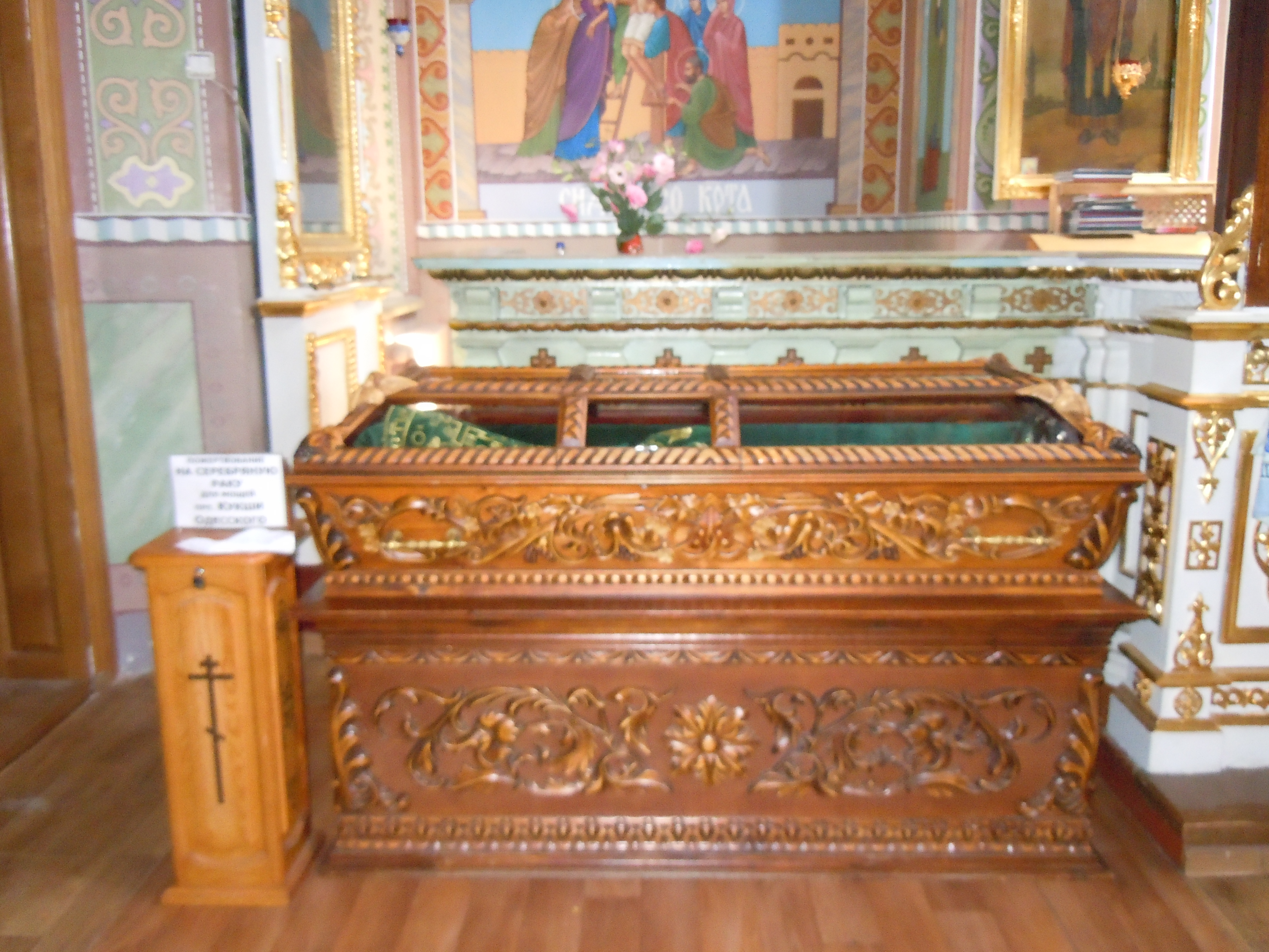 Комплекс споруд Святоуспенського монастиря. Церква Успіння Пресвятої Богородиці, Одеса, Маячний пров., 6